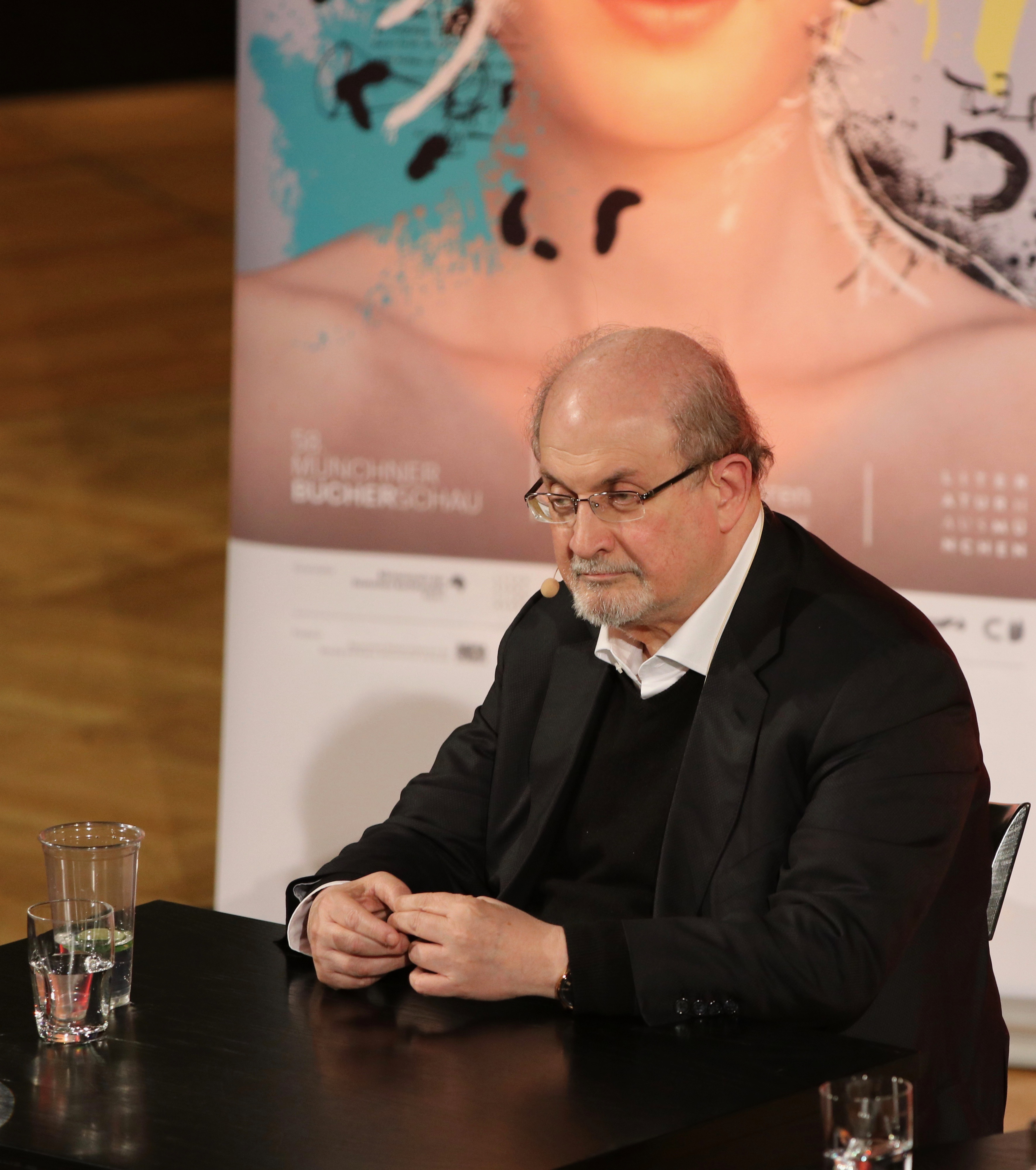 Salman Rushdie stellt auf dem Literaturfest München 2017 seinen Roman "Golden House" in der Großen Aula in der Ludwig-Maximilians-Universität vor.